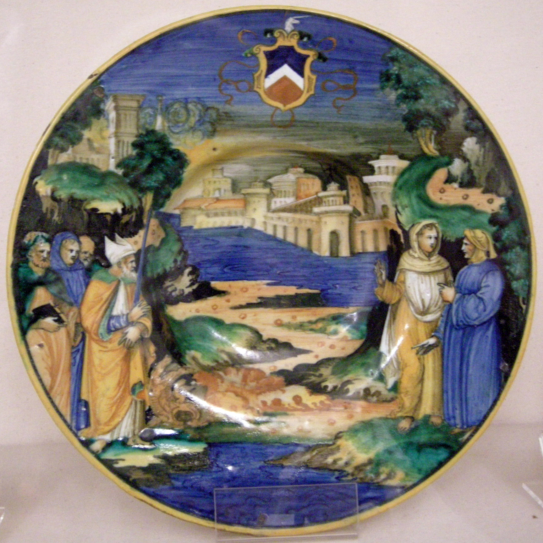 Museo Civico This is a photo of a monument which is part of cultural heritage of Italy.